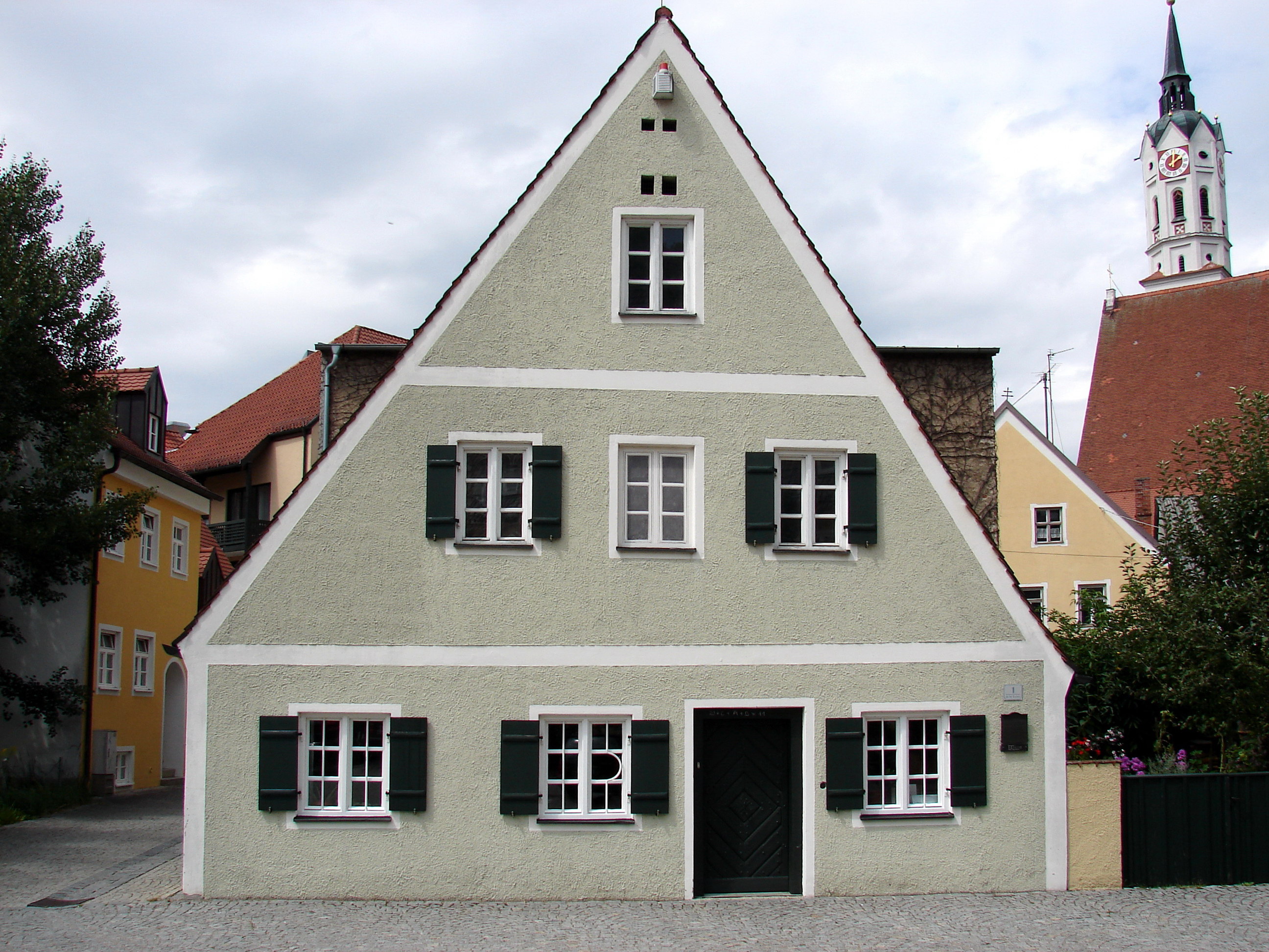 Ehemaliges Handwerkerhaus, sog. Zeiselmairhaus, eingeschossiger Steildachbau mit Putzgliederung, in Holzbauweise 1478 erbaut.